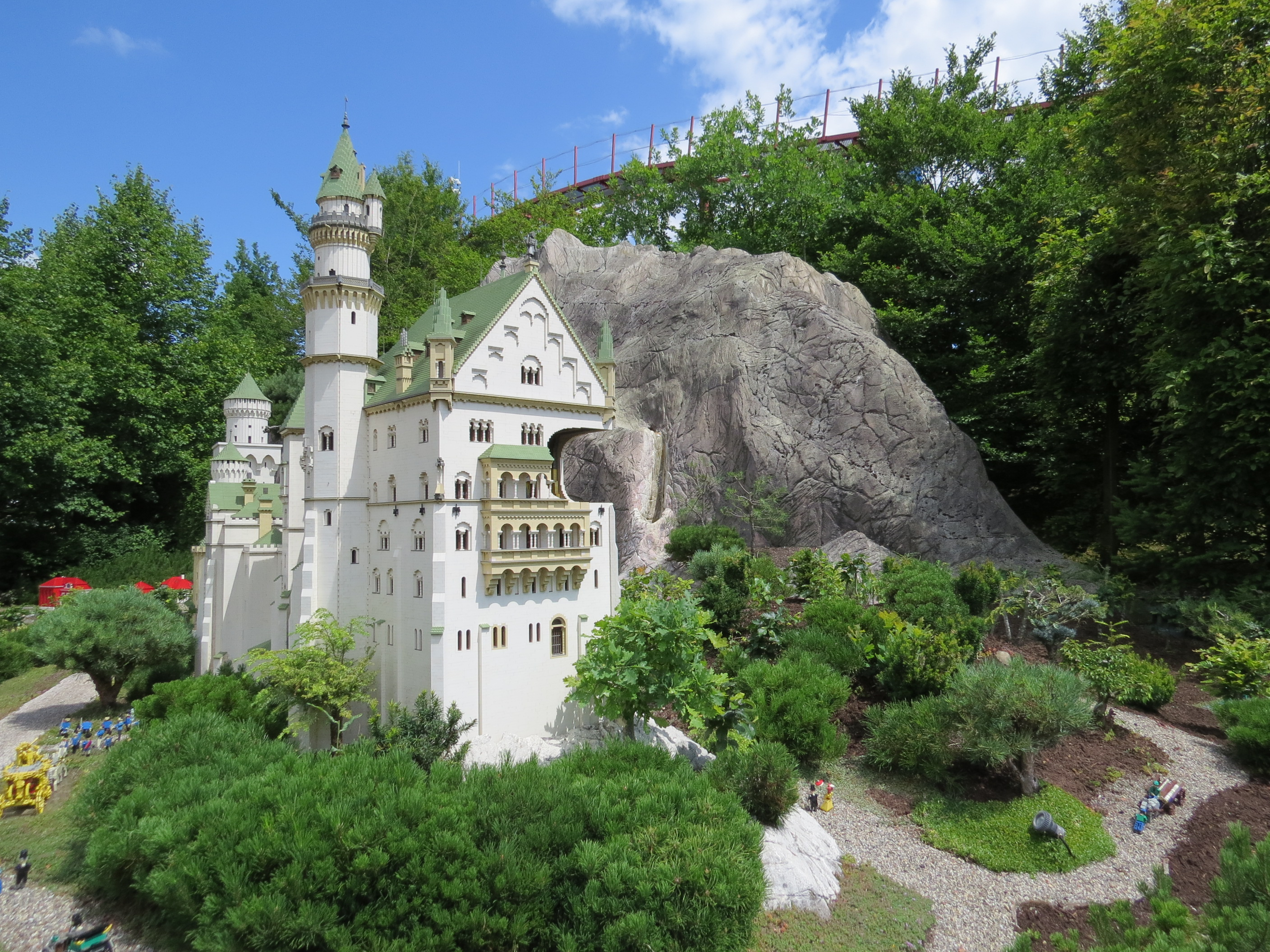 Legoland Deutschland Günzburg